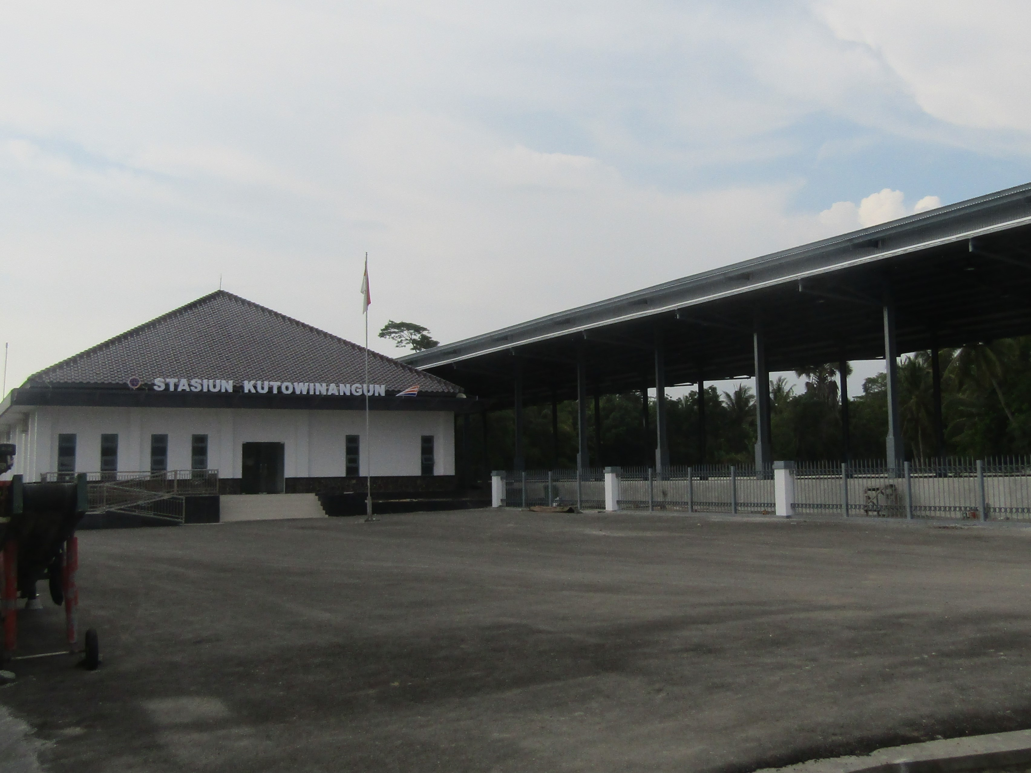 Tampak depan Stasiun Kutowinangun, 2019